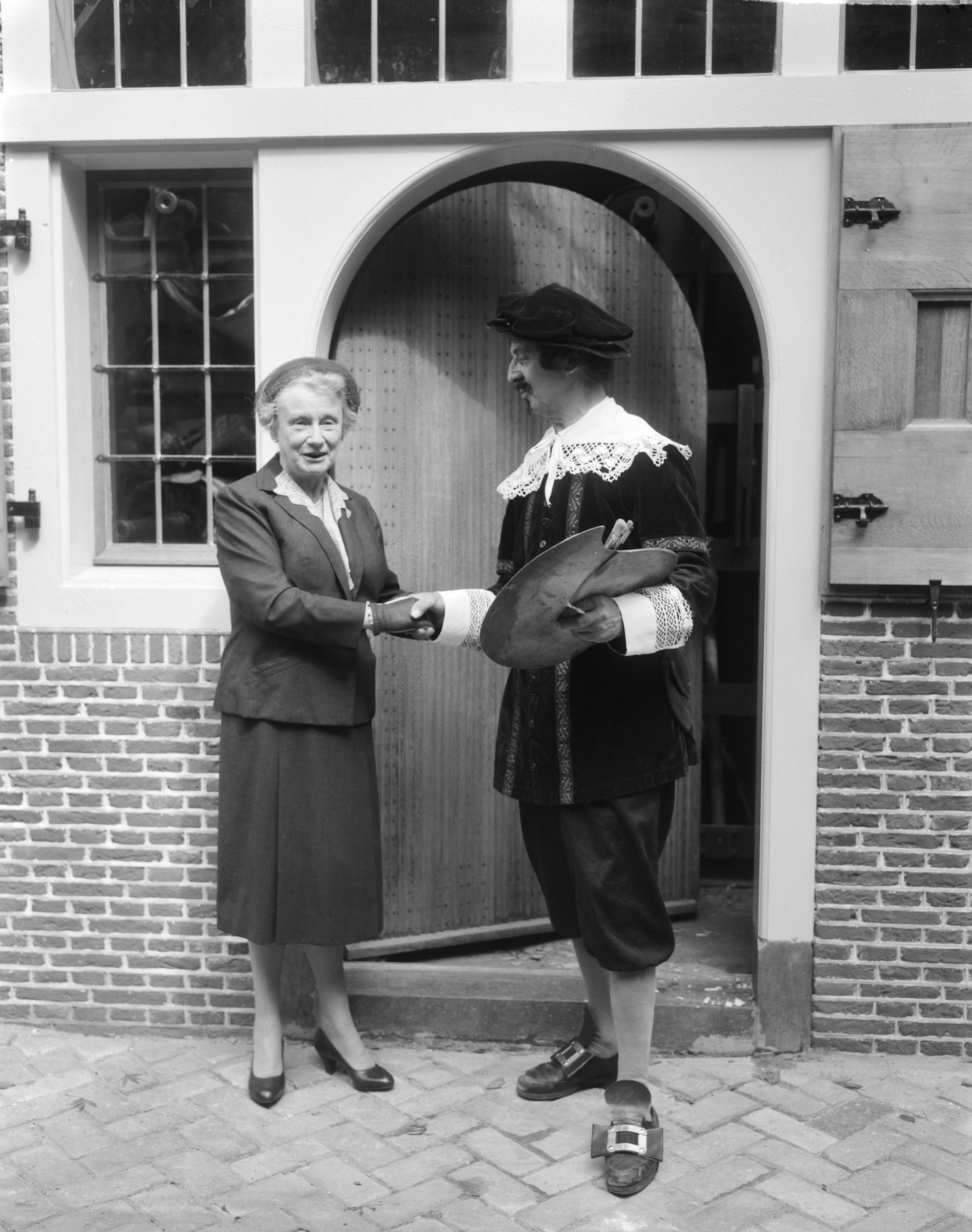 Collectie / Archief : Fotocollectie Anefo Reportage / Serie : [ onbekend ] Beschrijving : Geboortehuis van Rembrandt herbouwd aan de Weddesteeg te Leiden, mevrouw Van Kinschot (echtgenote Leidens burgemeester) met Rembrandt die haar bedankte Datum : 14 mei 1963 Locatie : Leiden, Zuid-Holland Trefwoorden : geboortehuizen, gevels, kunstschilders Persoonsnaam : Kinschot-Dorhout, J.M. van Fotograaf : Bilsen, Joop van / Anefo Auteursrechthebbende : Nationaal Archief Materiaalsoort : Negatief (zwart/wit) Nummer archiefinventaris : bekijk toegang 2.24.01.04 Bestanddeelnummer : 915-1572 Reacties Geplaatst door Geertruida op 26 april 2015 - 22:06. Persoonsnamen: Josina Margaretha van Kinschot- Dorhout Mees